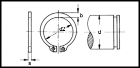 DIN 471